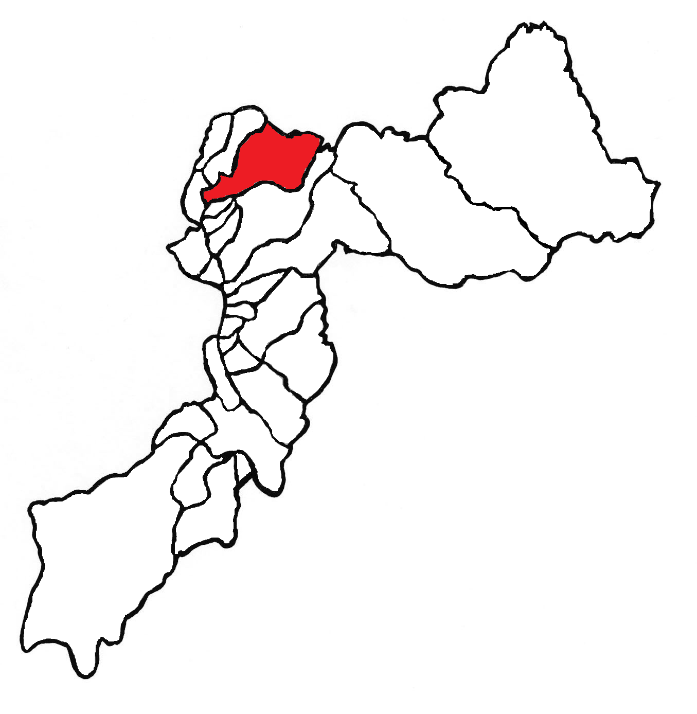 Ubicación del distrito en la provincia de Huancayo, departamento de Junín, Perú